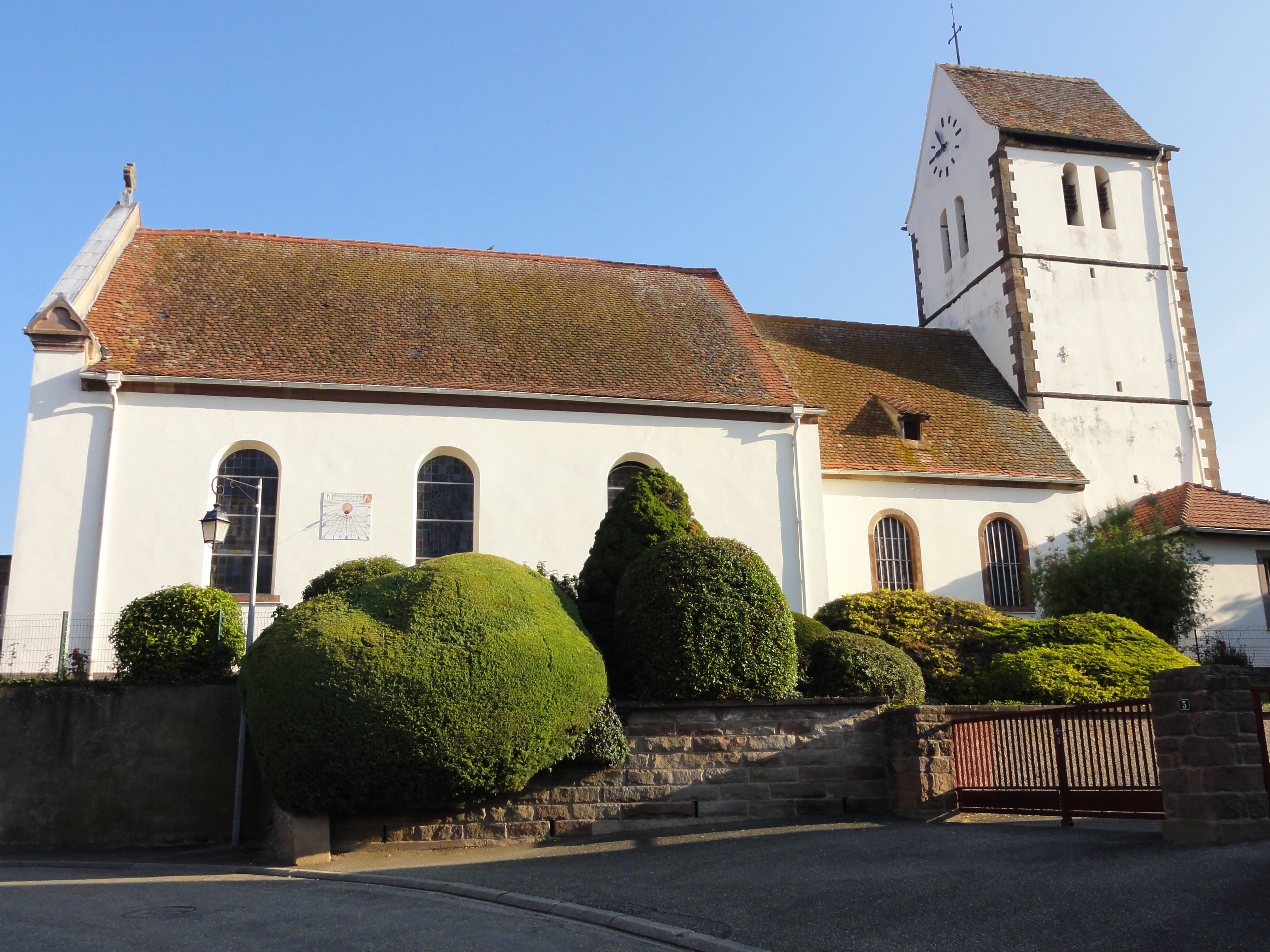 Alsace, Bas-Rhin, Pfettisheim, Église Saint-Symphorien: (IA67000912).